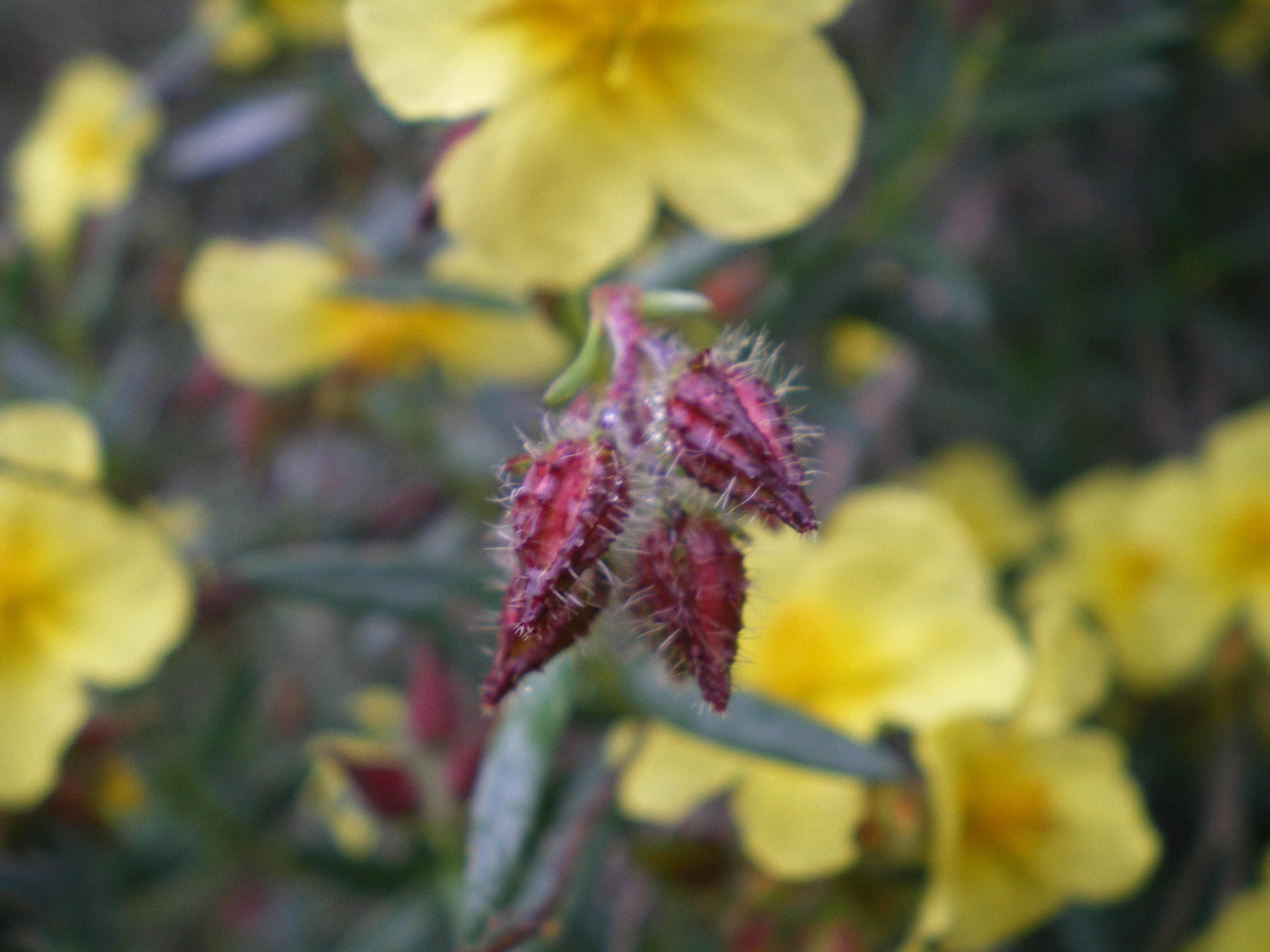 Capullo piloso de Helianthemum alypoides, cistácea endémica de Almería